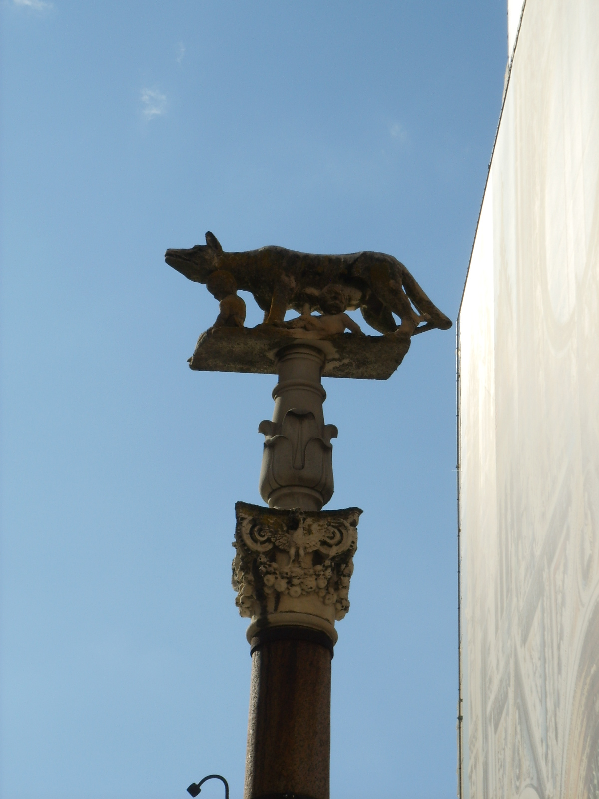 Lupa, from Duomo Square, in Siena, Italy